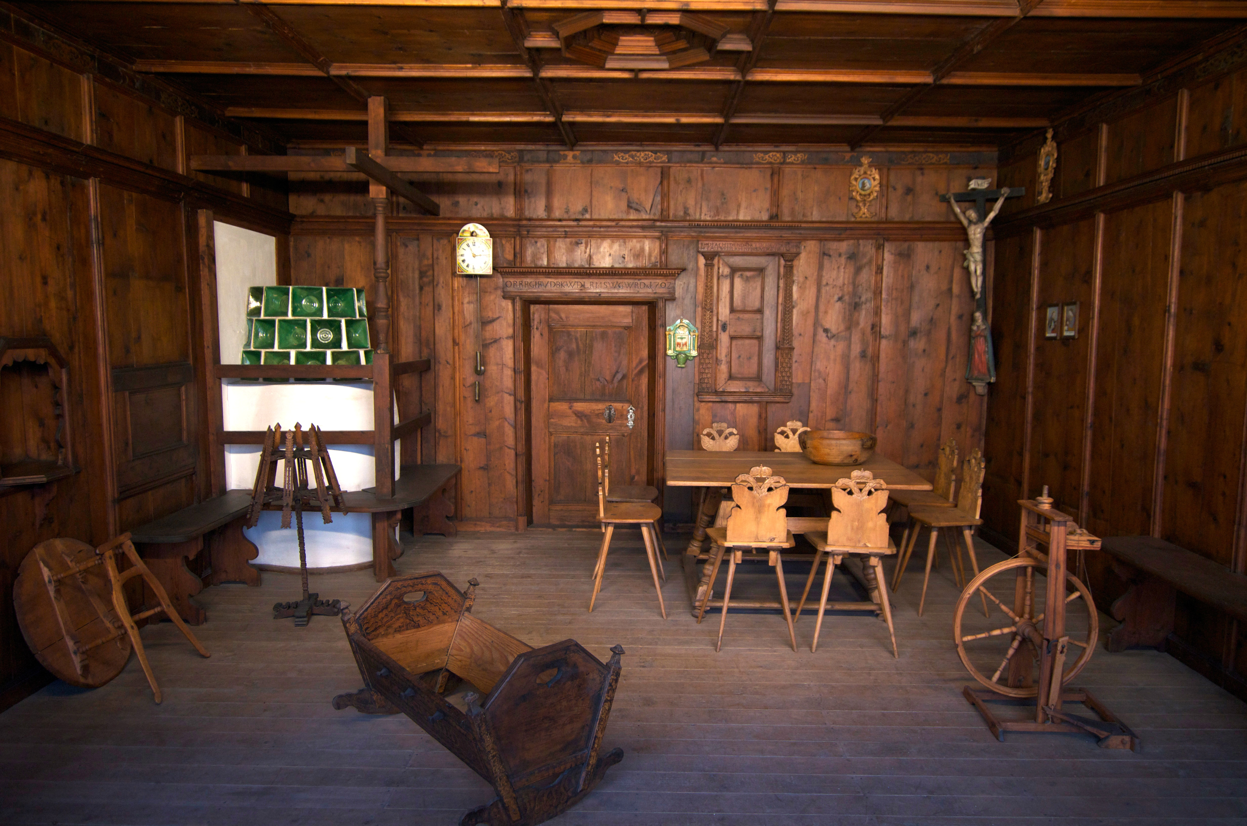 Stube; Germanisches Nationalmuseum Nürnberg